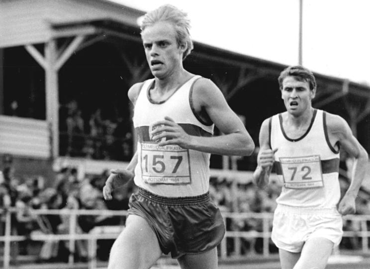 Hansjörg Kunze, Werner Schildhauer ADN-ZB Kluge 6.5.84 Potsdam: DDR-Meisterschaften in der Leichtathletik- Über 10.000 Meter wurde am 5.5.84 der WM-Dritte Hansjörg Kunze (SC Empor Rostock, l.) zum erstenmal DDR-Meister. Er entschied das Rennen nach etwa 8.000 Metern zu seinen Gunsten, als er sich von Vize-Weltmeister und Titelverteidiger Werner Schildhauer (SC Chemie Halle, r.) absetzen konnte und mit einer Temposteigerung auf den letzten beiden Kilometern noch auf 27:33,10 min.kam. Abgebildete Personen: Kunze, Hansjörg Schildhauer, Werner